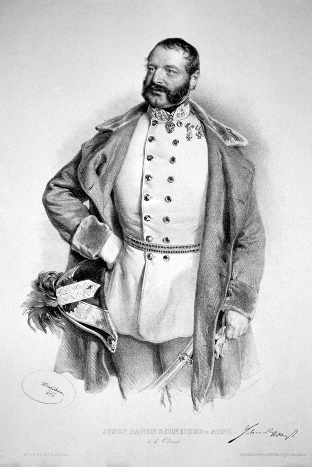 Josef Schneider Freiherr von Arno (1811-1857), k. k. Generalmajor